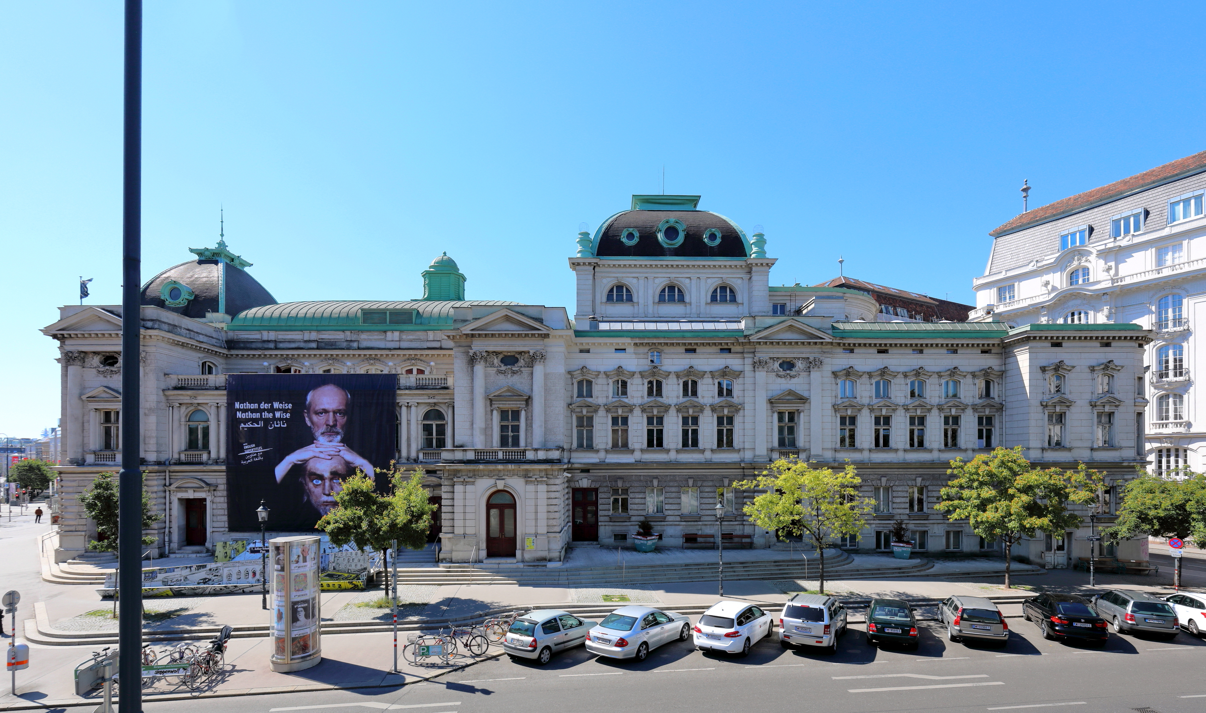 Nordansicht des Volkstheater am Arthur-Schnitzler-Platz im 7. Wiener Gemeindebezirk Neubau.Das Theater wurde ab 1887 nach Plänen von Hermann Helmer und Ferdinand Fellner in Neorenaissanceformen errichtet und am 14. September 1889 mit Ludwig Anzengrubers Schauspiel „Der Fleck auf der Ehr’“ als Deutsches Volkstheater eröffnet.